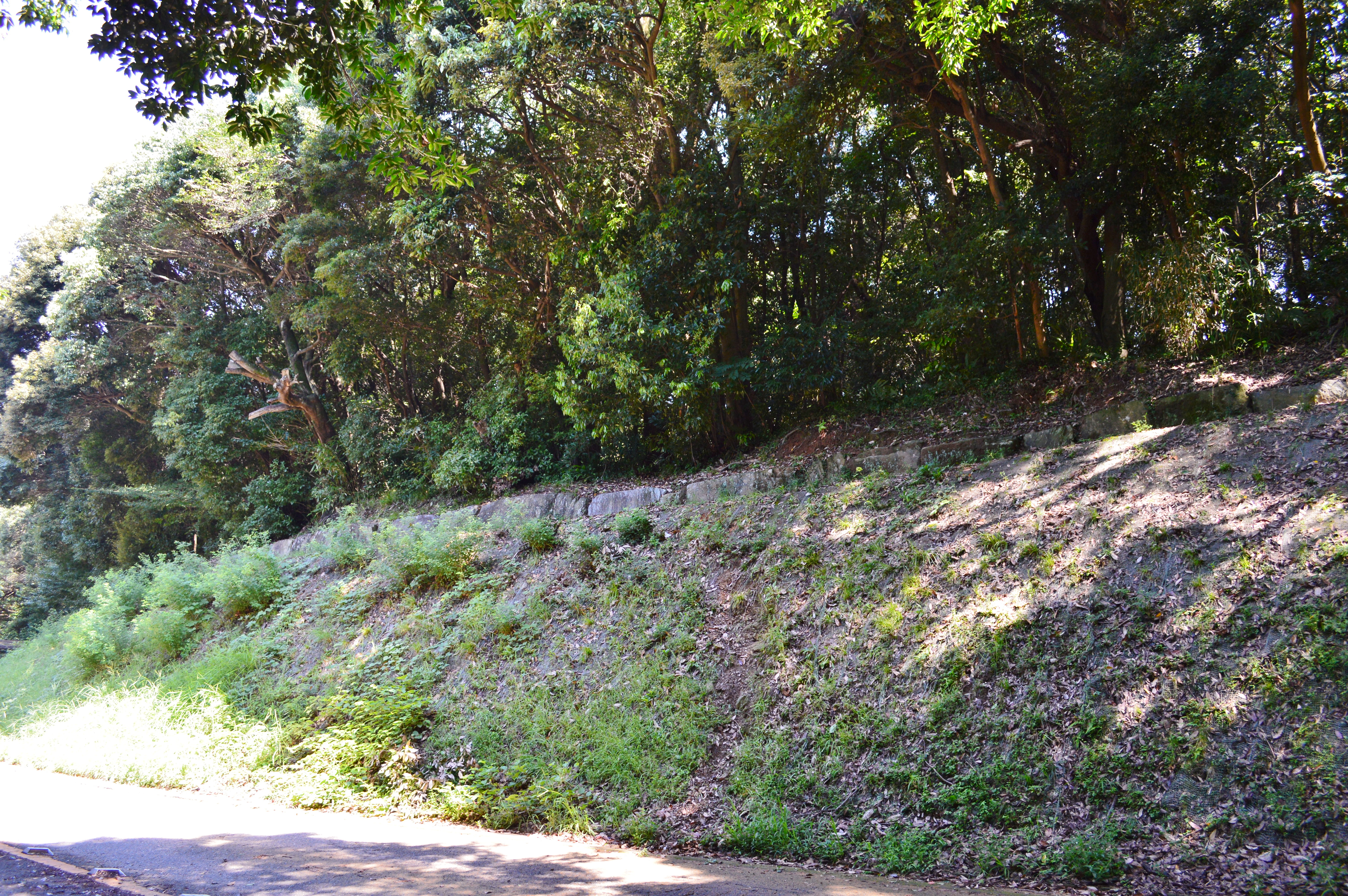 高良山神籠石 列石